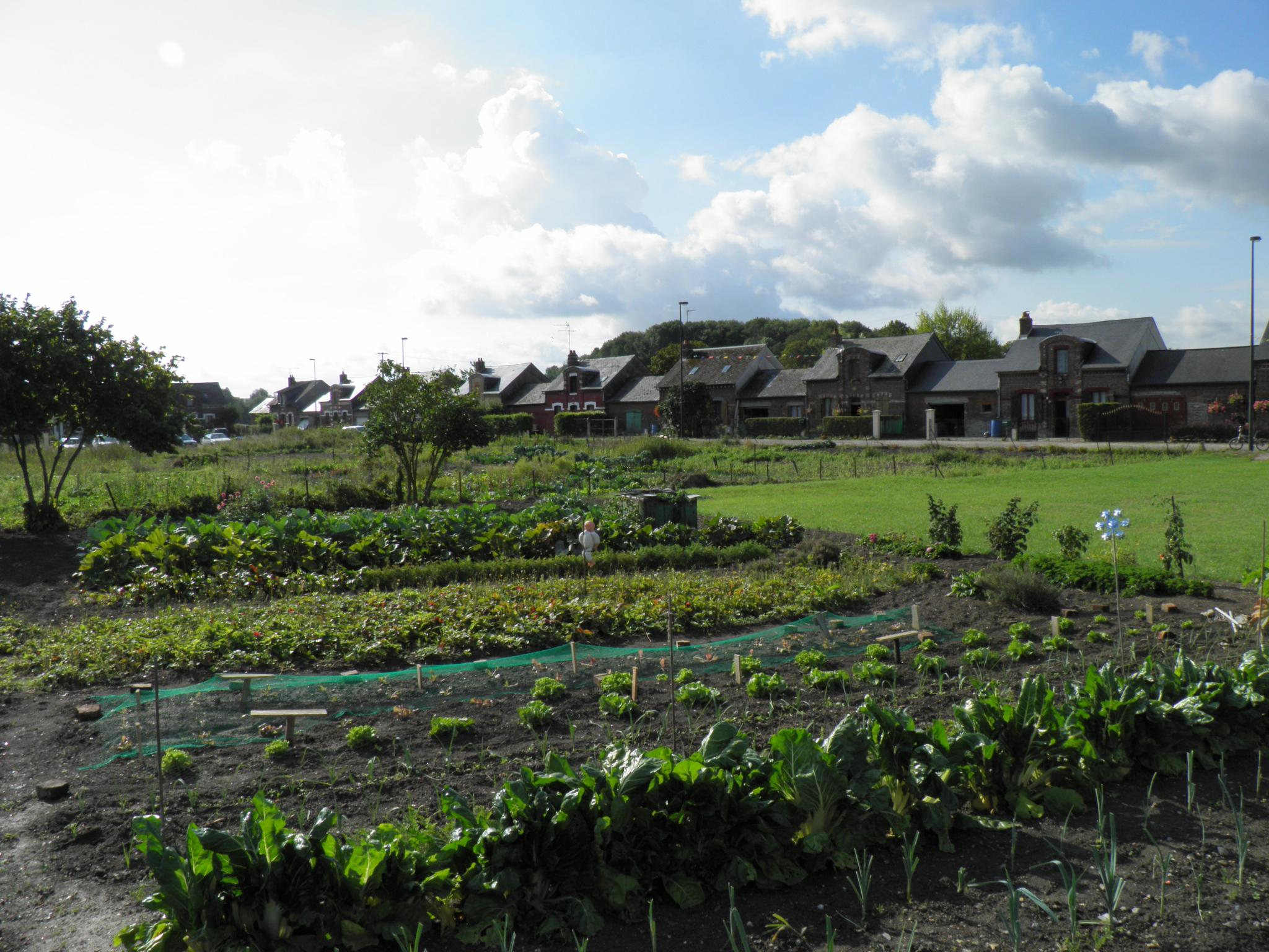 Cité Denin à Nesle-Normandeuse (Seine-Maritime). Un deuxième alignement de 12 maisons est présent côté sud. Au centre de la cité, se trouvent les jardins ouvriers liés à chaque logement.